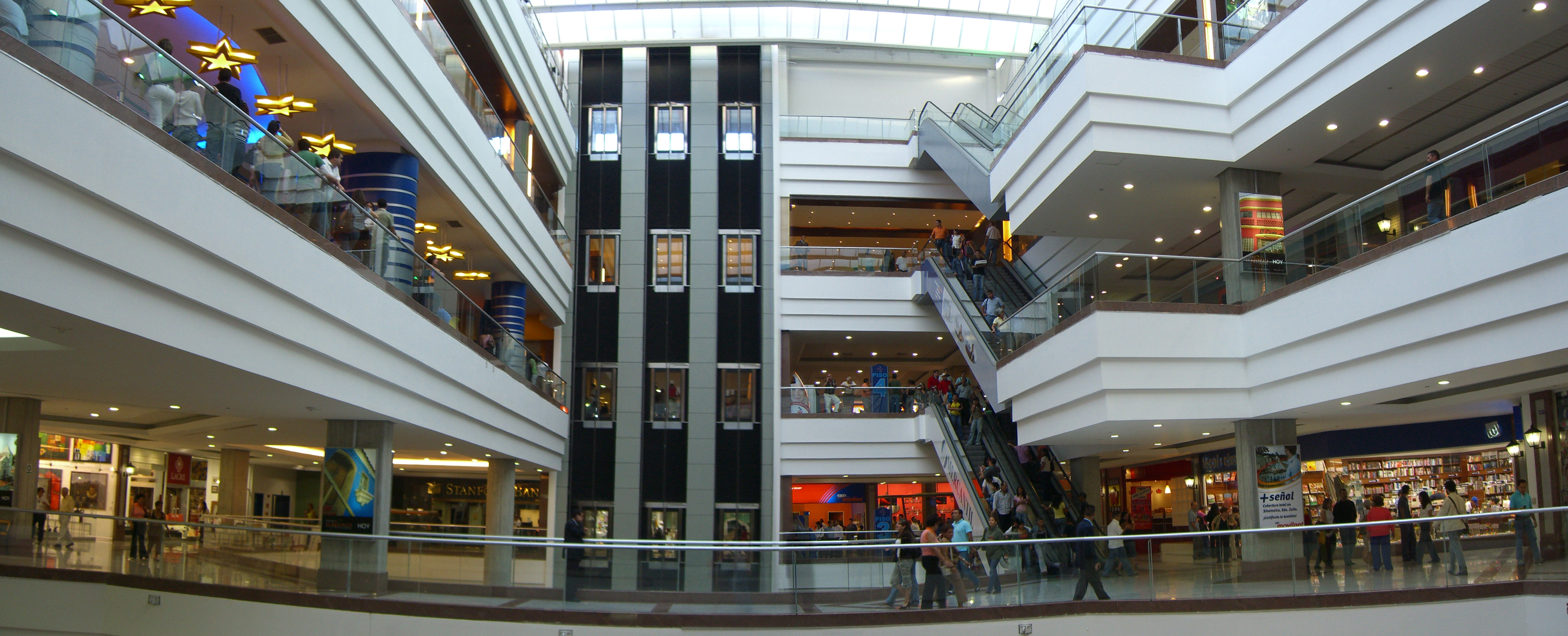 Dos fotos del Centro Comercial Paseo El Hatillo juntadas con el programa Calico. Quería tomar una o dos filas más hacia abajo, pero un guardia de seguridad no me dejó terminar, aparentemente está prohibido tomar fotos en el lugar, al menos que sean fotos de familiares y amigos.